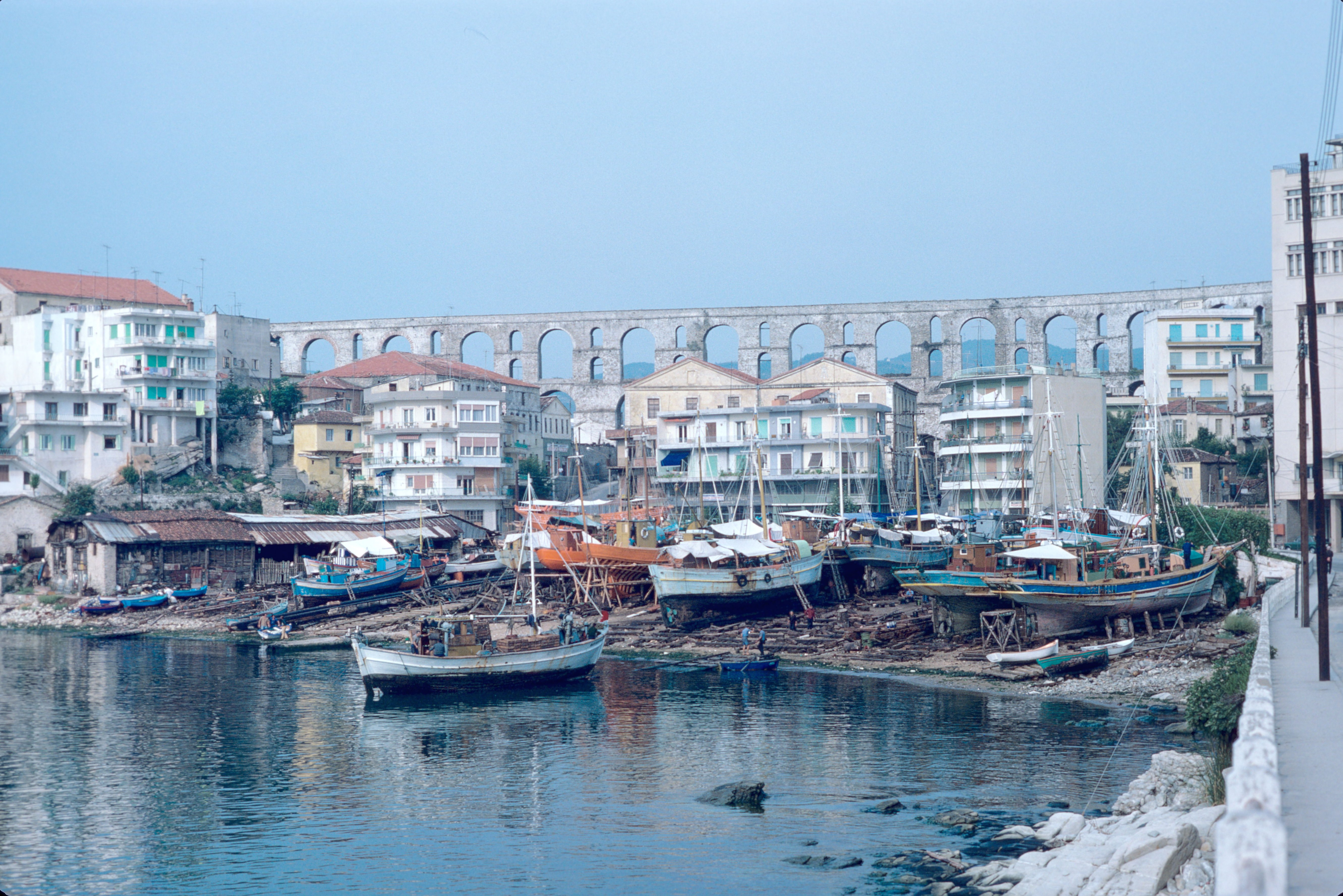 Une cale bien animée et presque complète de bateaux de pêche en réparation et en construction. Les embarcations sont les unes derrière les autres. Il semble que les pêcheurs sur leur bateau attentent que ce dernier soit hissé sur la cale. A l'arrière plan, un aqueduc romain domine l'ensemble. Cette cale de construction navale est située près de la place Nikotsara à Kavala en Grèce.